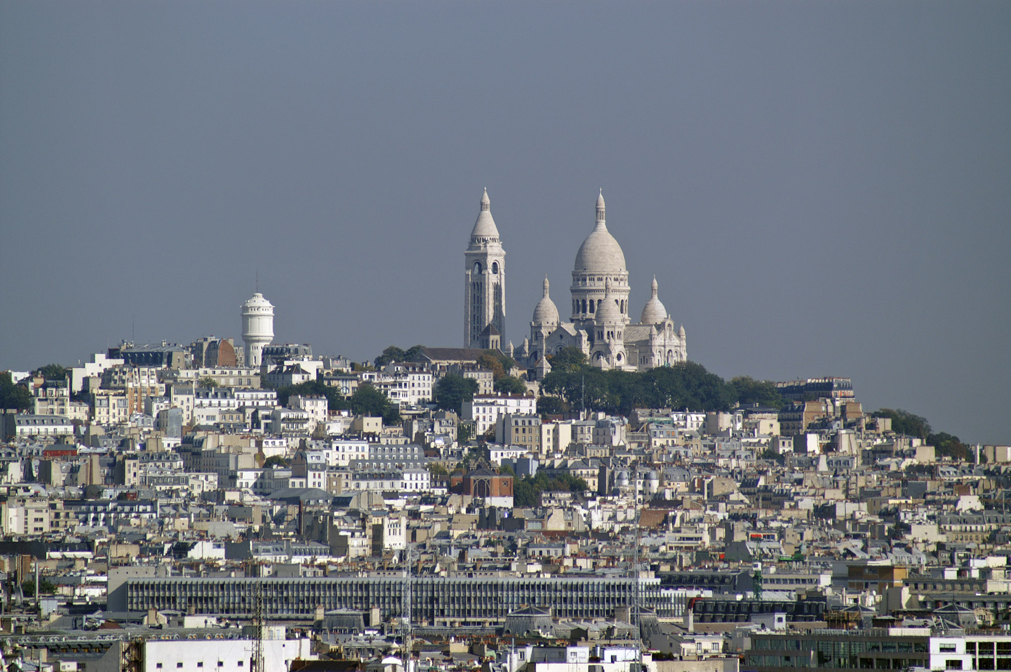 Basilique du Sacre Coeur vu de la Tour Eiffel - Basilica of the Sacré Cœur view from the Eiffel Tower